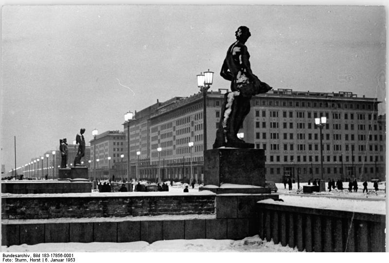 Berlin, Stalinallee, Wohnblock, Abend Zentralbild Sturm 6.1.1953 Januararbeit in der Berliner Stalinallee.-Blick von der Deutschen Sporthalle auf Block C-Süd.